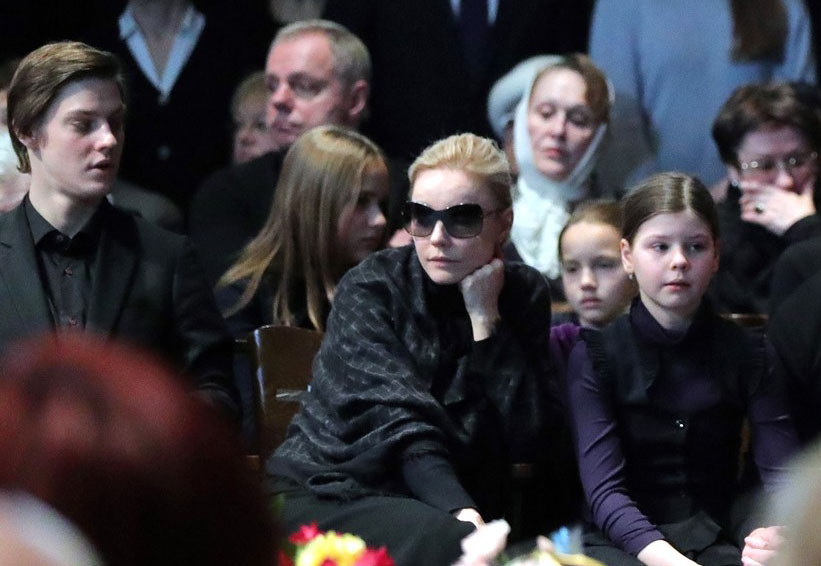 Семья Олега Павловича Табакова. Сын Павел Табаков, вдова Марина Зудина, дочь Мария на церемонии прощания во МХТ им. Чехова